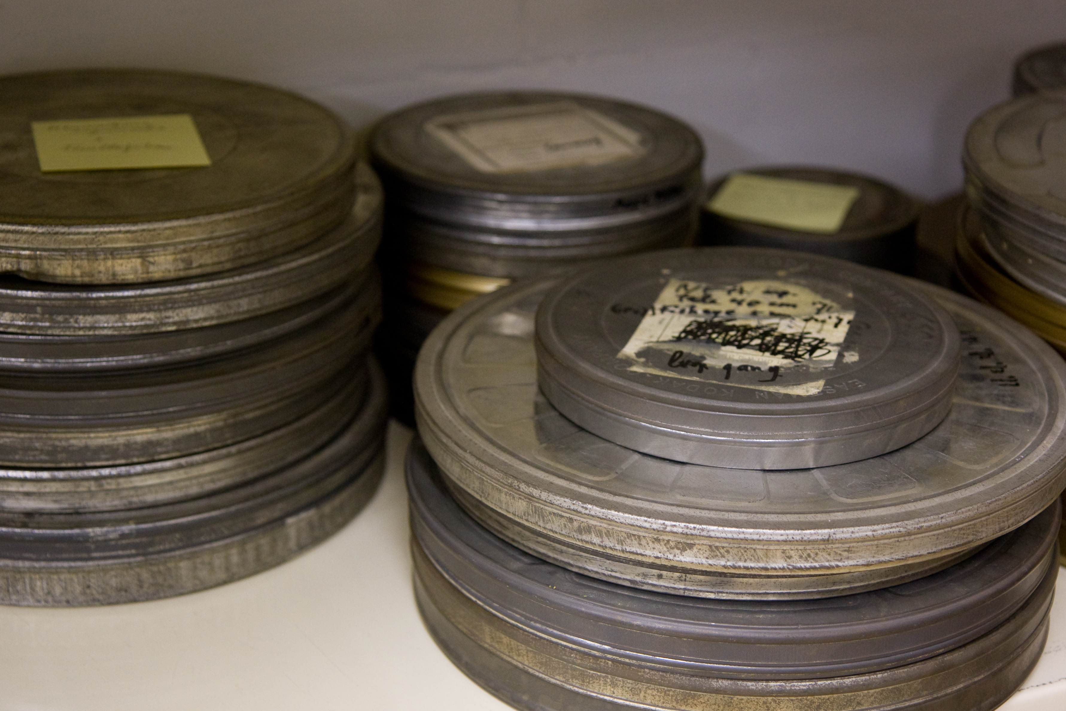 Film containers